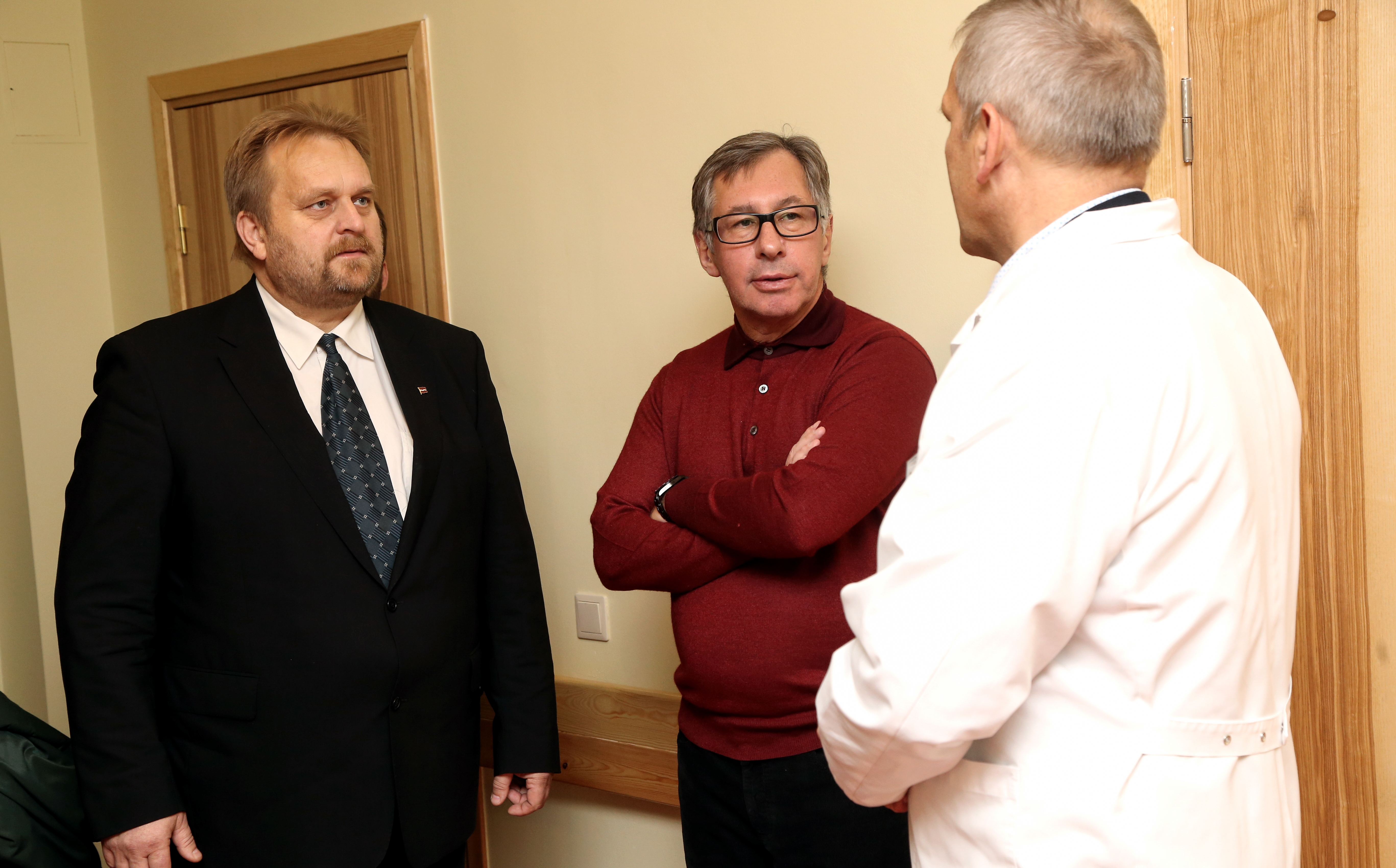 Pjotrs Avens persongi ieradījies Madonās slimnīcā, lai uzdāvināt ultrasonogrāfu Dzemdību nodaļai.